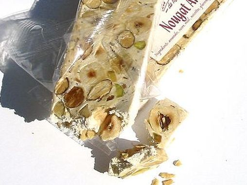 Detall d'un tros de nogat trencat per poder-ne apreciat la textura, que és tova. (Al contrari que el torró, per exemple)